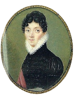 Portrait de Victorine Mounier